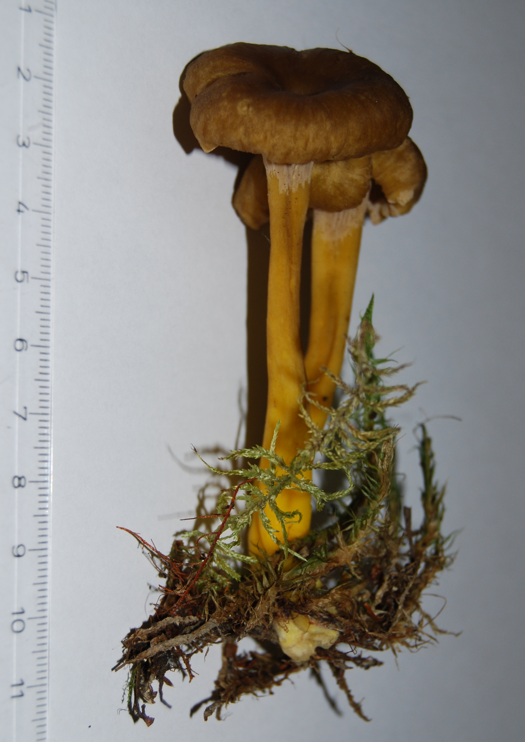 Česky: liška nálevkovitá